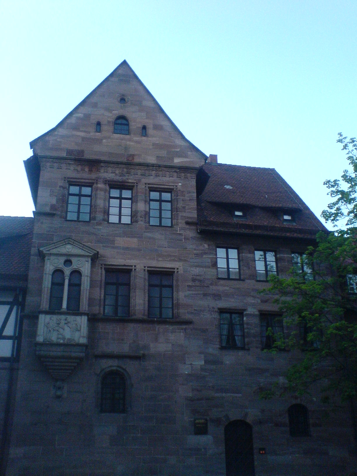 Tucherschloss Nürnberg, Südfassade